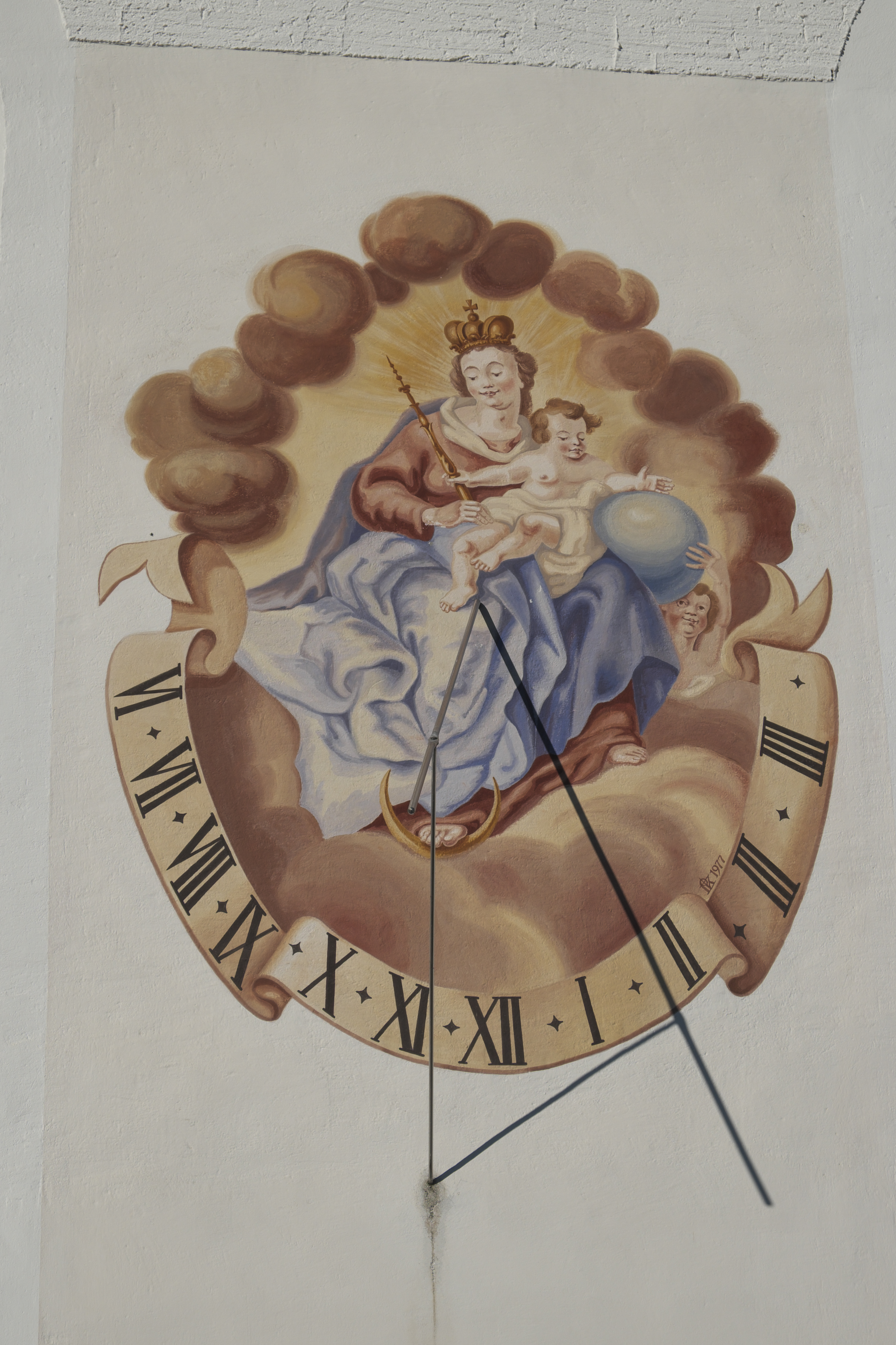 Katholische Pfarrkirche Mariä Himmelfahrt in Hohenfurch im oberbayerischen Landkreis Weilheim-Schongau (Bayern/Deutschland), Sonnenuhr